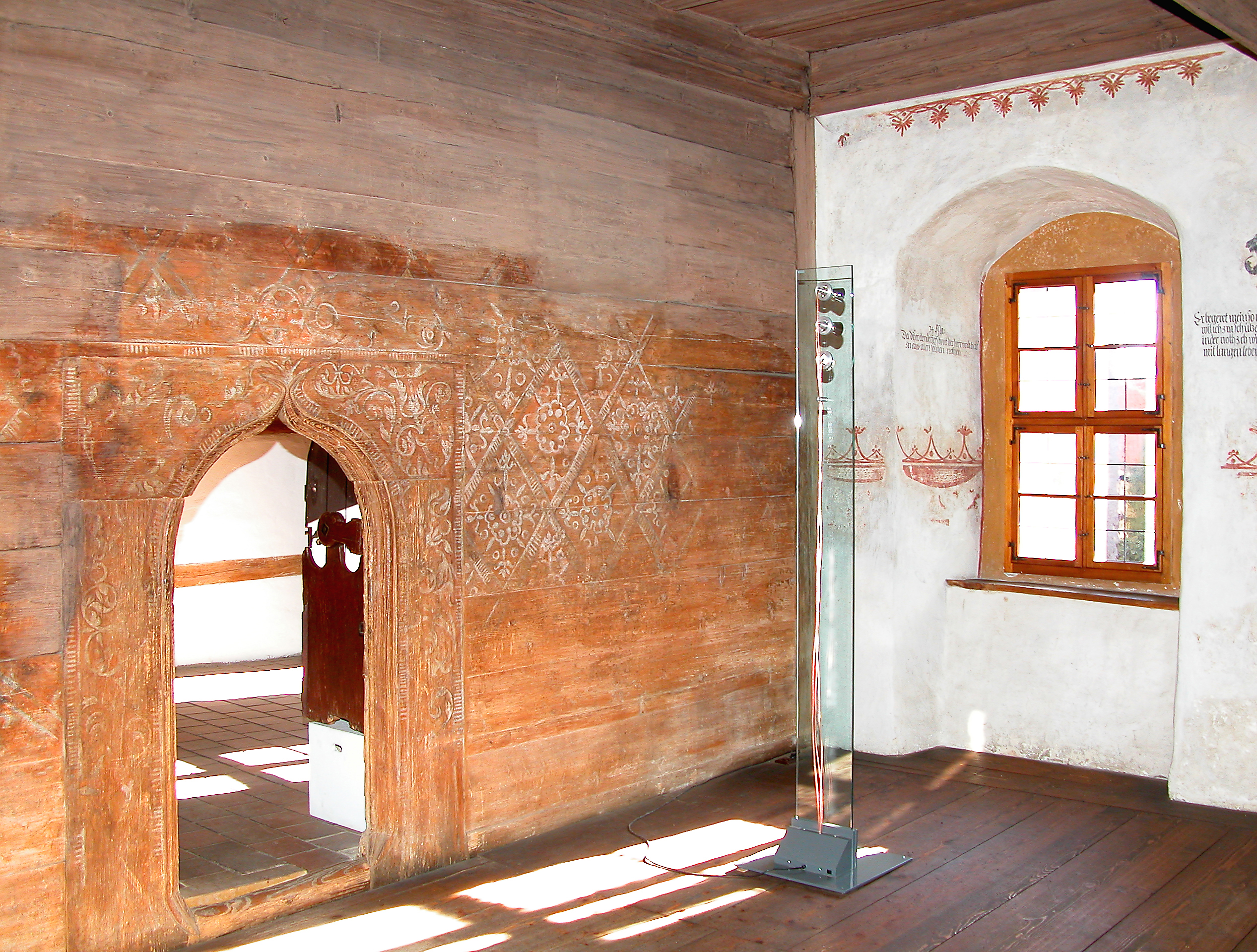 15.10.2007 08115 Schönfels (Gemeinde Lichtentanne): Burg Altschönfels, Museum. Bohlenstube im Obergeschoß mit Kielbogentür. [DSCN30597.TIF]20071015195DR.JPG(c)Blobelt